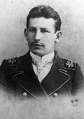 Вацлаў Леанардавіч Іваноўскі